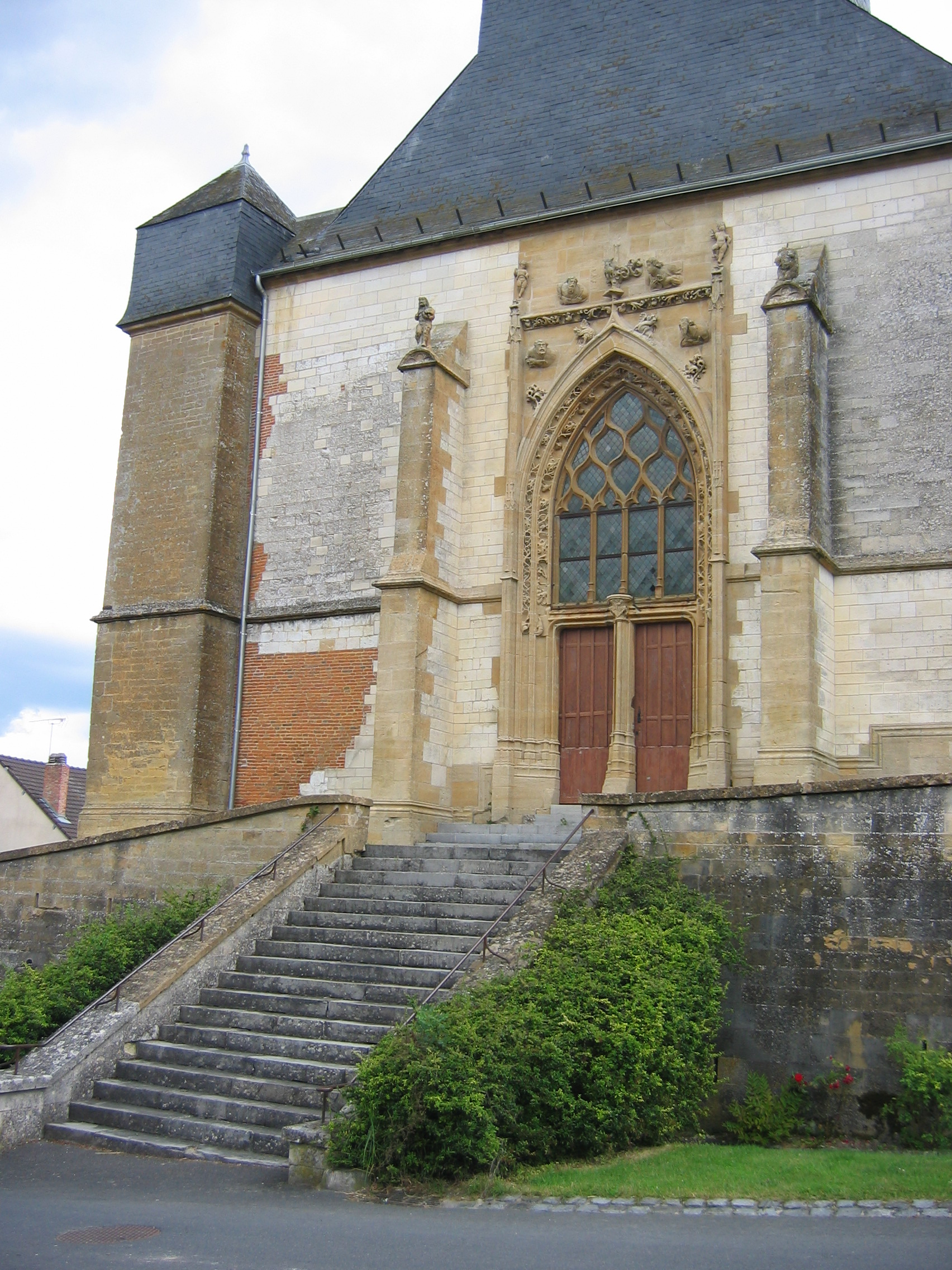 Escalier de l'ancien cimetièrede Savigny-sur-Aisne, en Ardennes, France